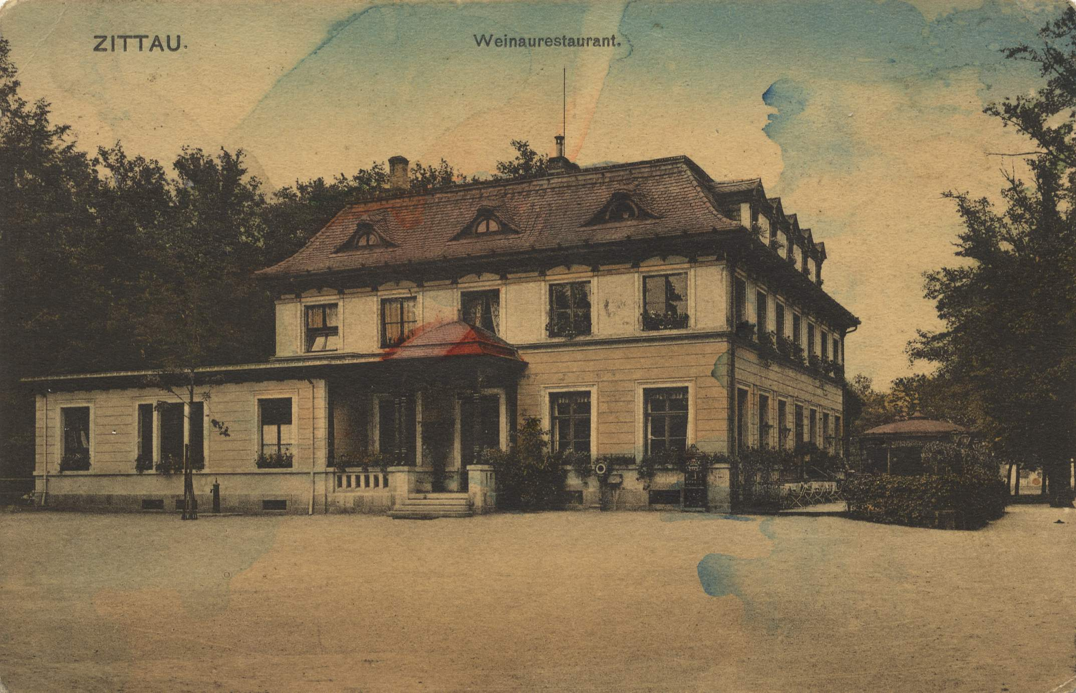 Postkarte vom Weinaurestaurant